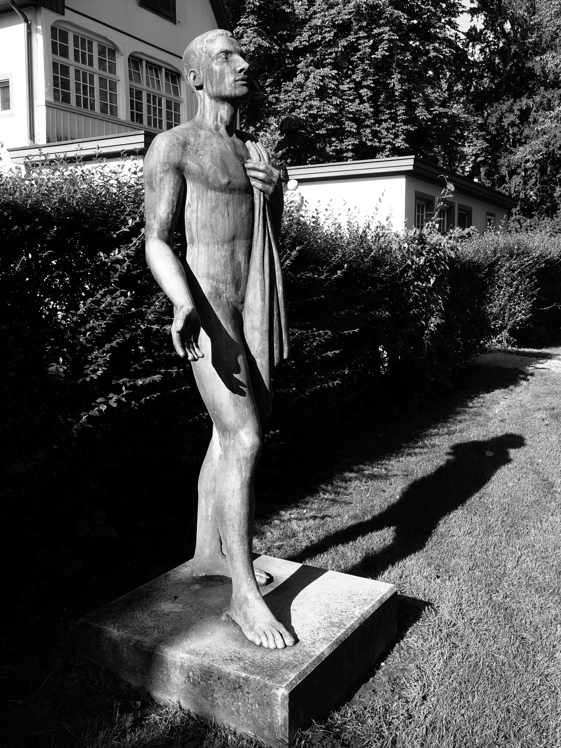 Skulptur von Hanns Joerin (1888–1961). Ecke Bahnhofstrasse/Hauptrasse, Restaurant zum Park